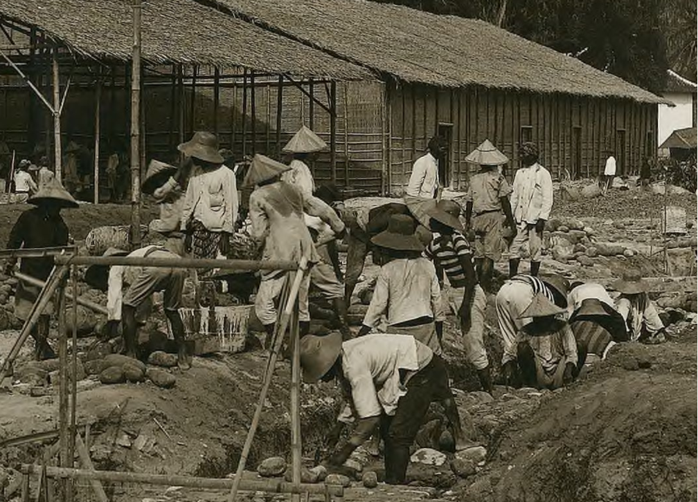 Proses pembangunan Pabrik Gula Cepiring